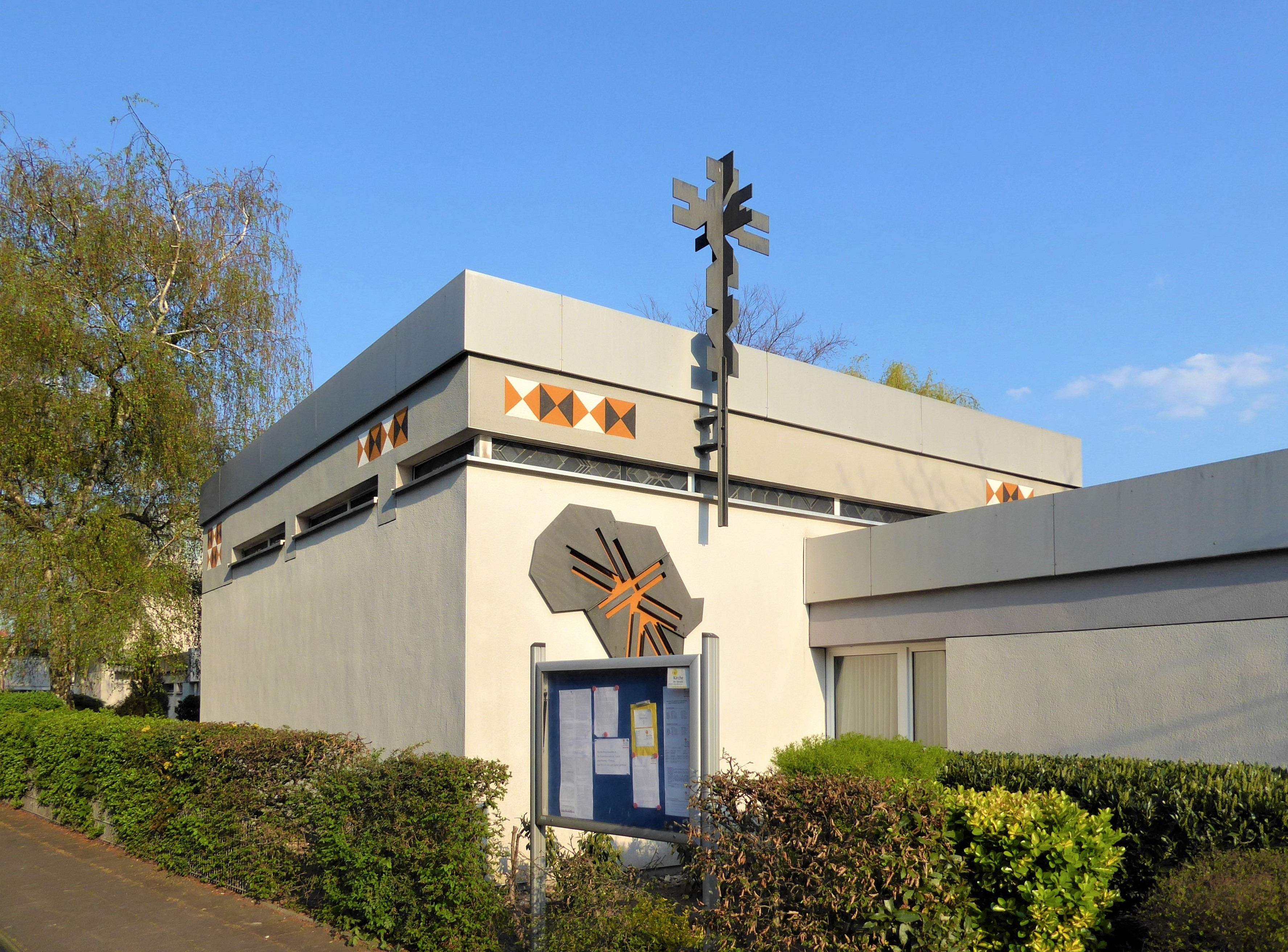 Kapelle des Afrikanums (Köln-Bilderstöckchen)